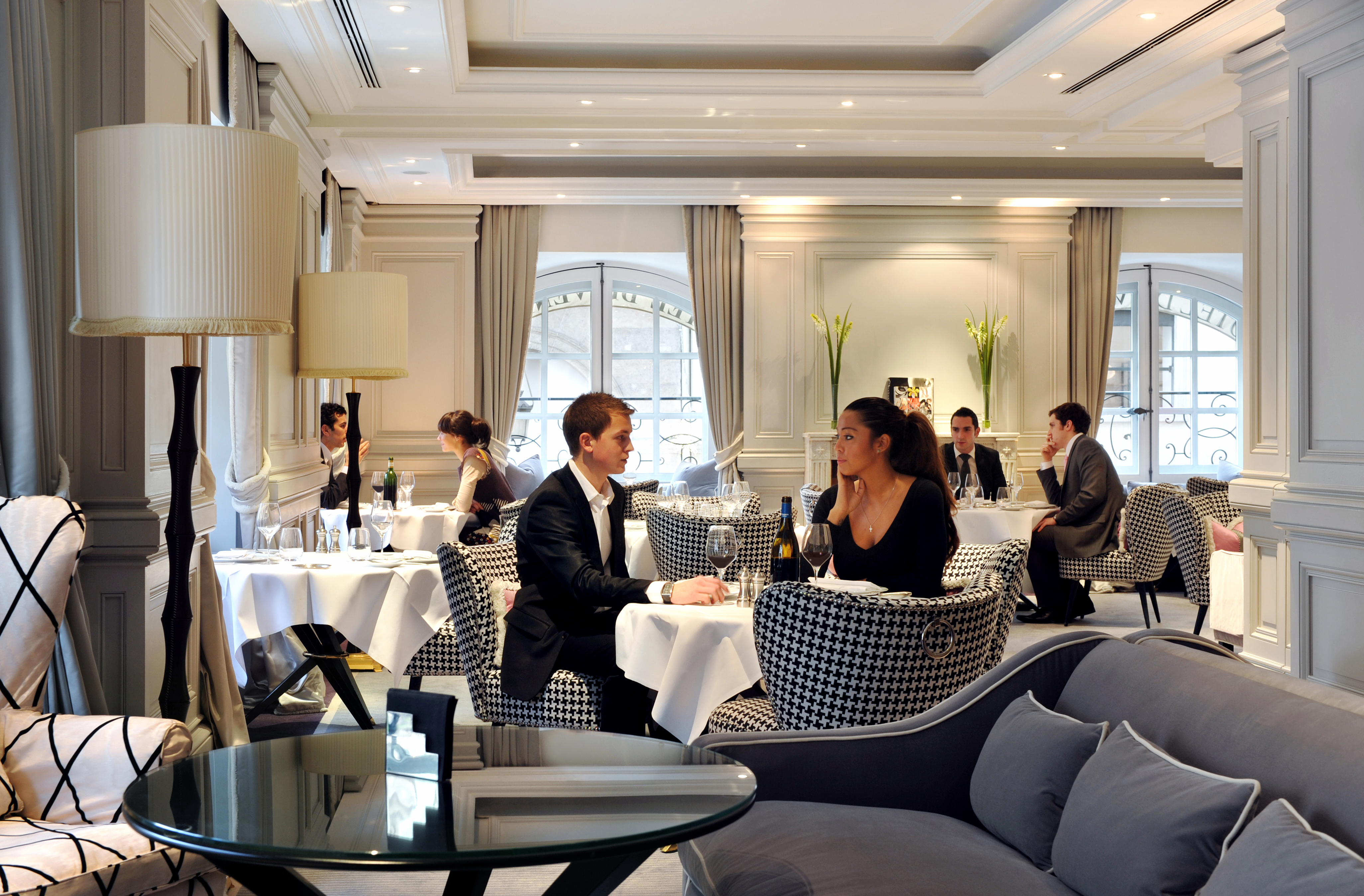 Le restaurant 1 Place Vendôme propose une cuisine raffinée de saison et des cocktails créatifs au bar.